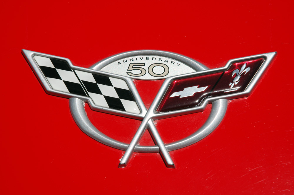 2003 Corvette logo